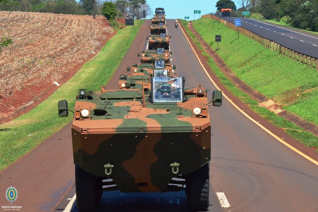 Cavalaria